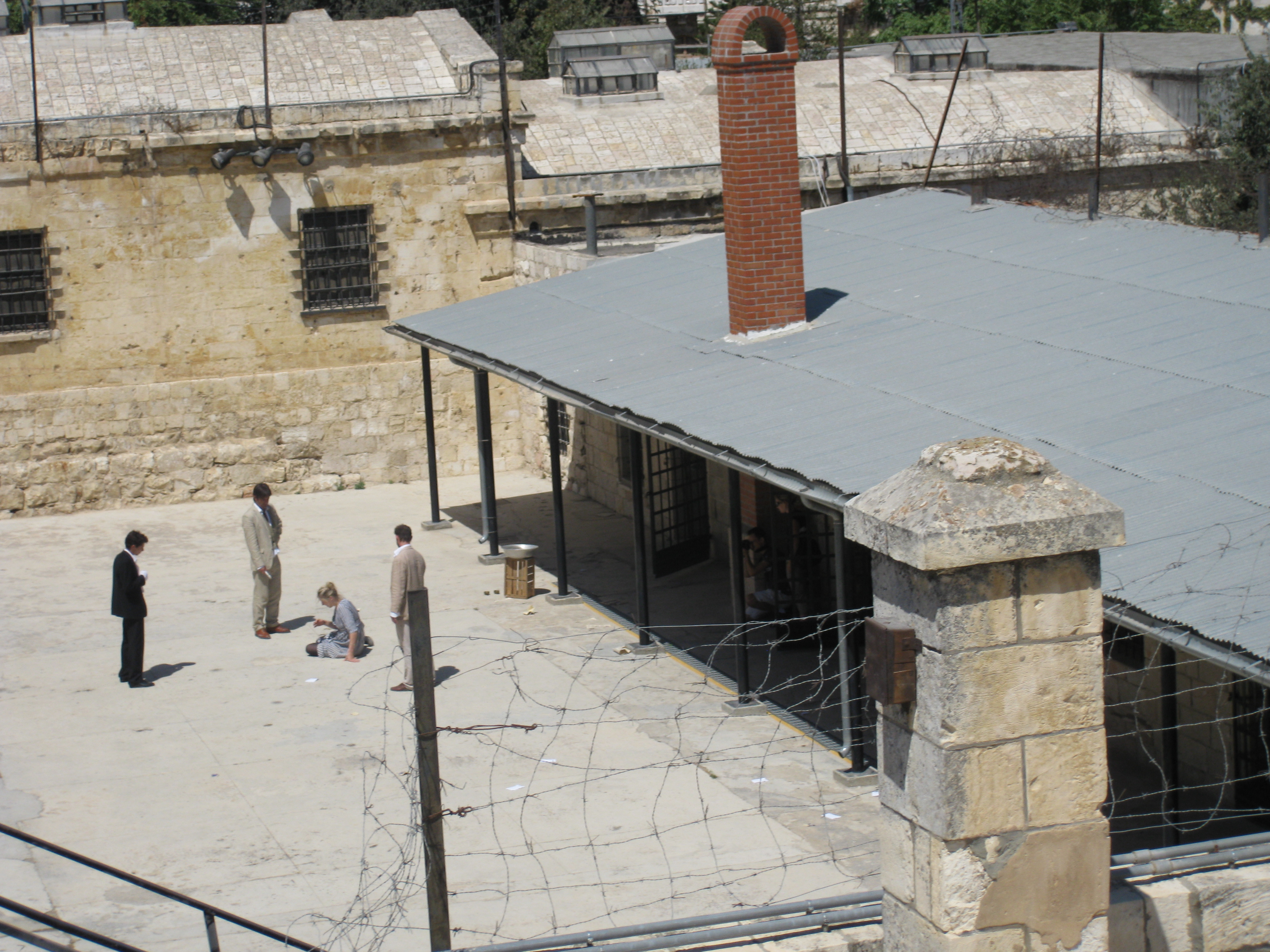 Museum of the Underground Prisoners Rehearsals for the play Alma played at the museum מוזיאון אסירי המחתרות חזרות לקראת עבור המחזה אלמה של תאטרון הקאמרי